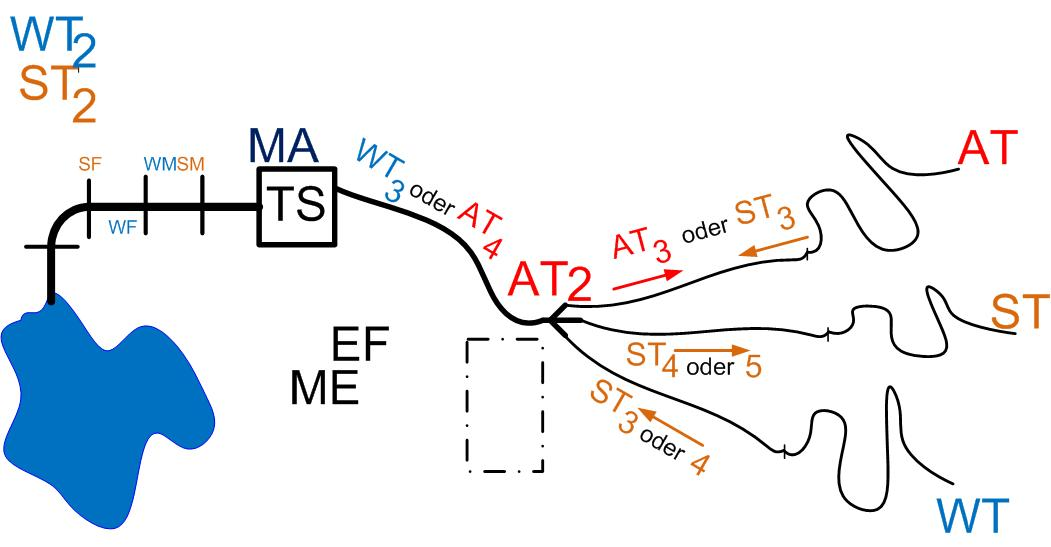 FwDV 3 offenens Gewaesser ausgefuellt mit Tätigkeitseinfolge